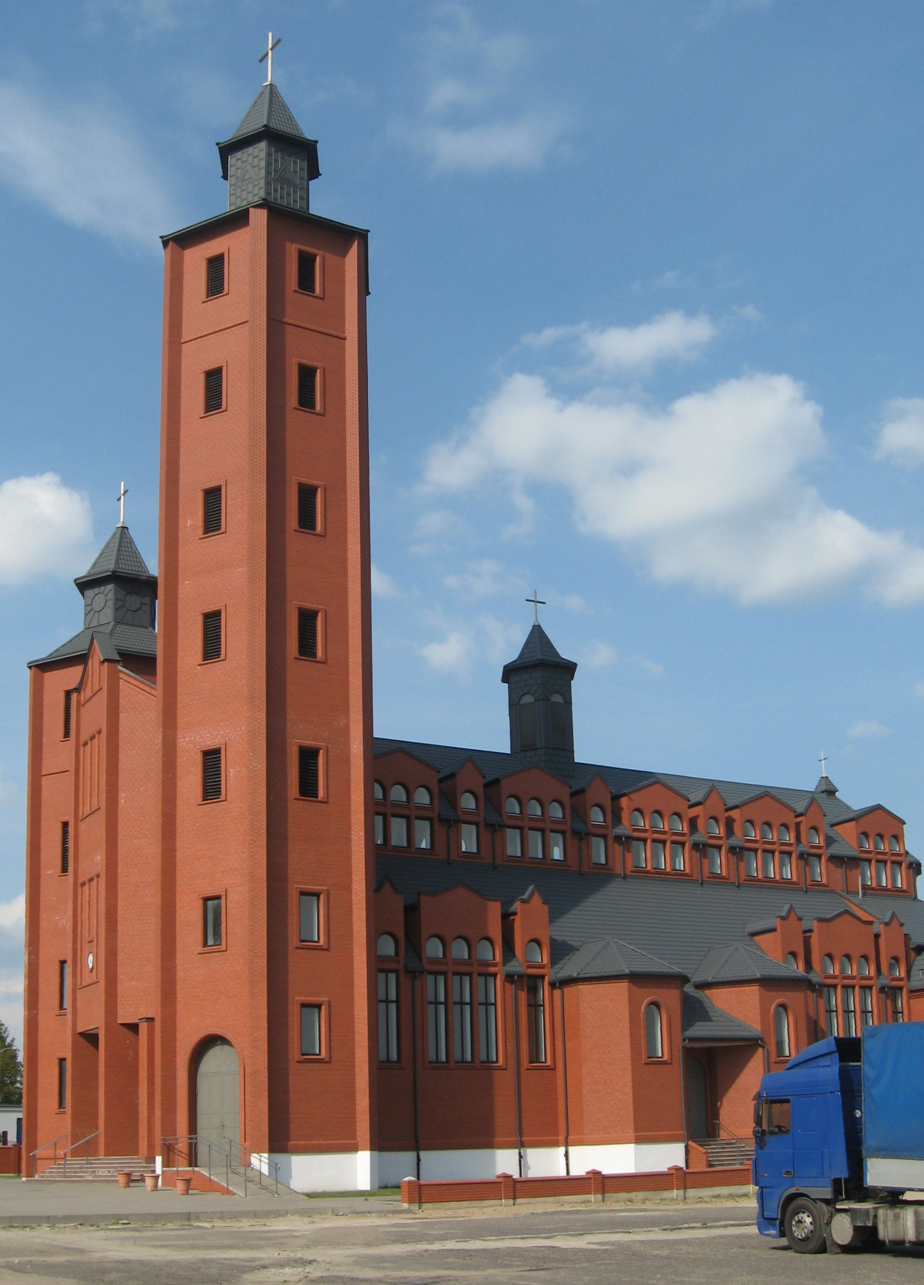 Kościół Trójcy Świętej - widok od strony Łosic